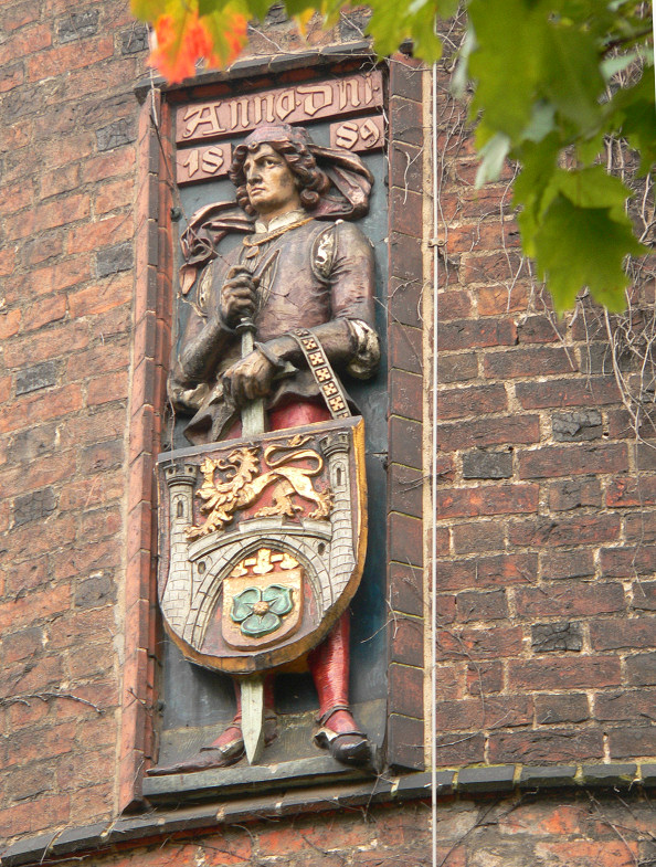 Döhrener Turm, Detail zur Restaurierung 1889